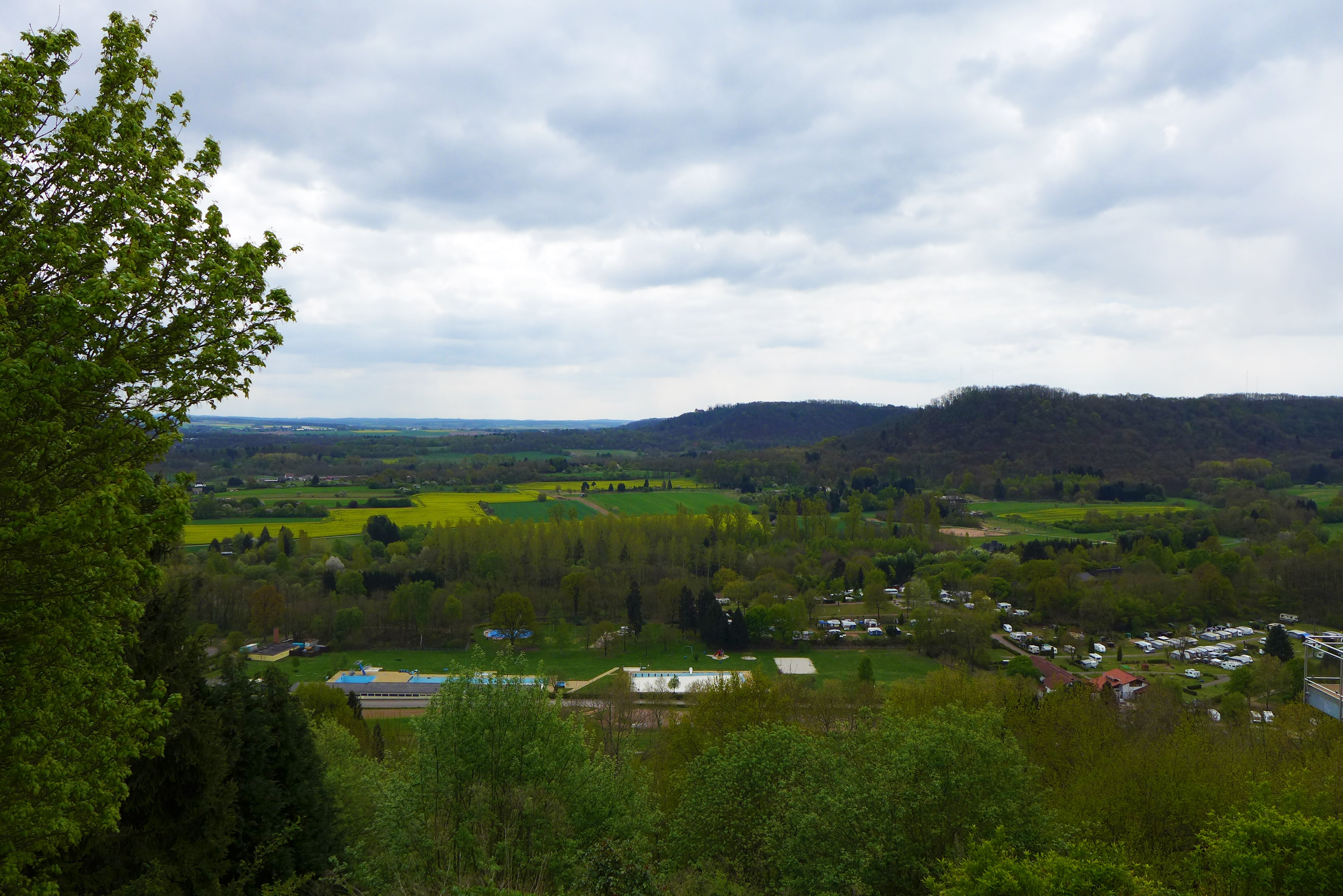 Wallerfangen, Blick vom Hansenberg auf das Areal des Freibades und des Campingplatzes im Blauloch